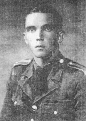 Fotografie válečného hrdiny plukovníka Stanislava Popelky